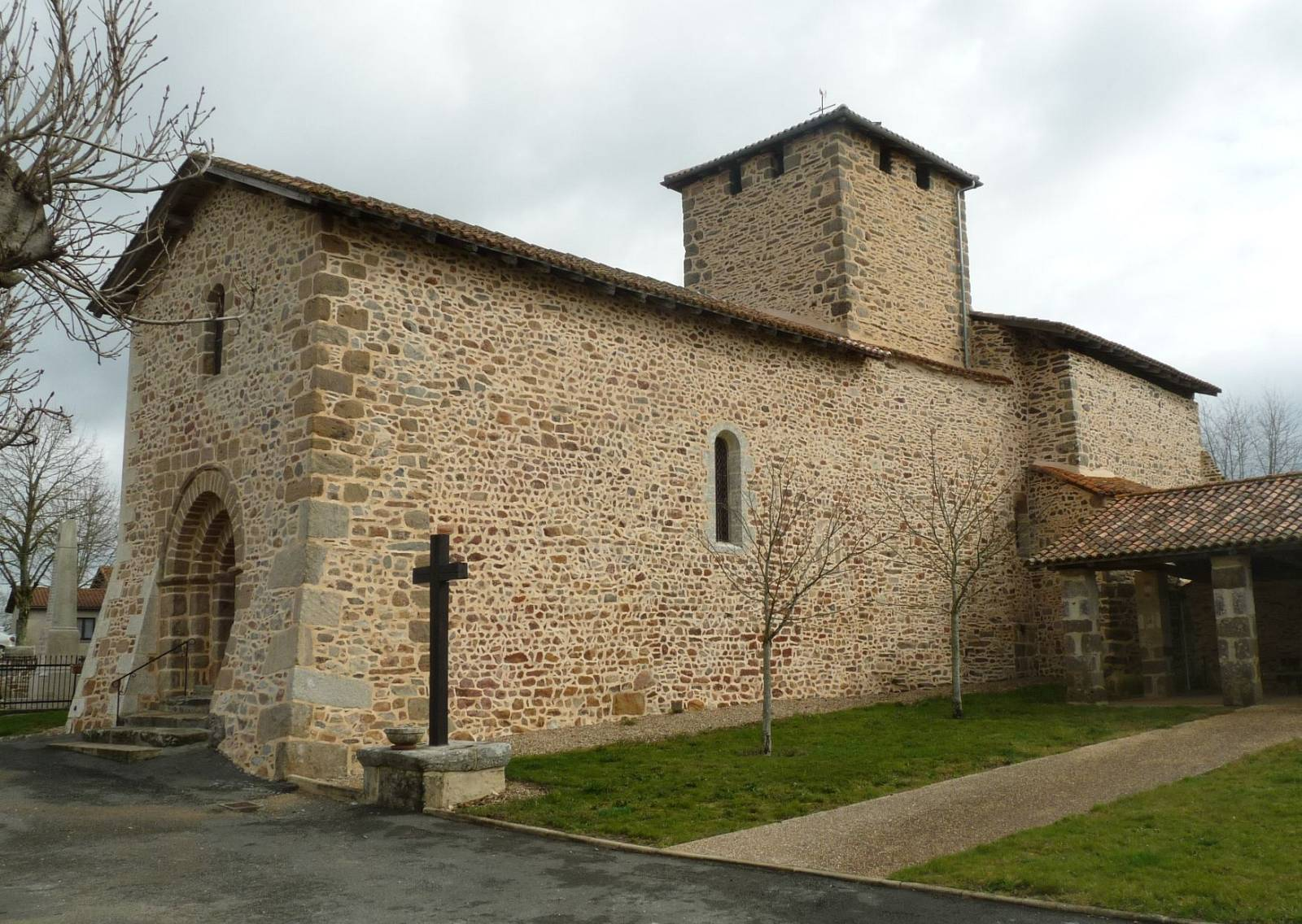 église de Mouzon, Charente, France